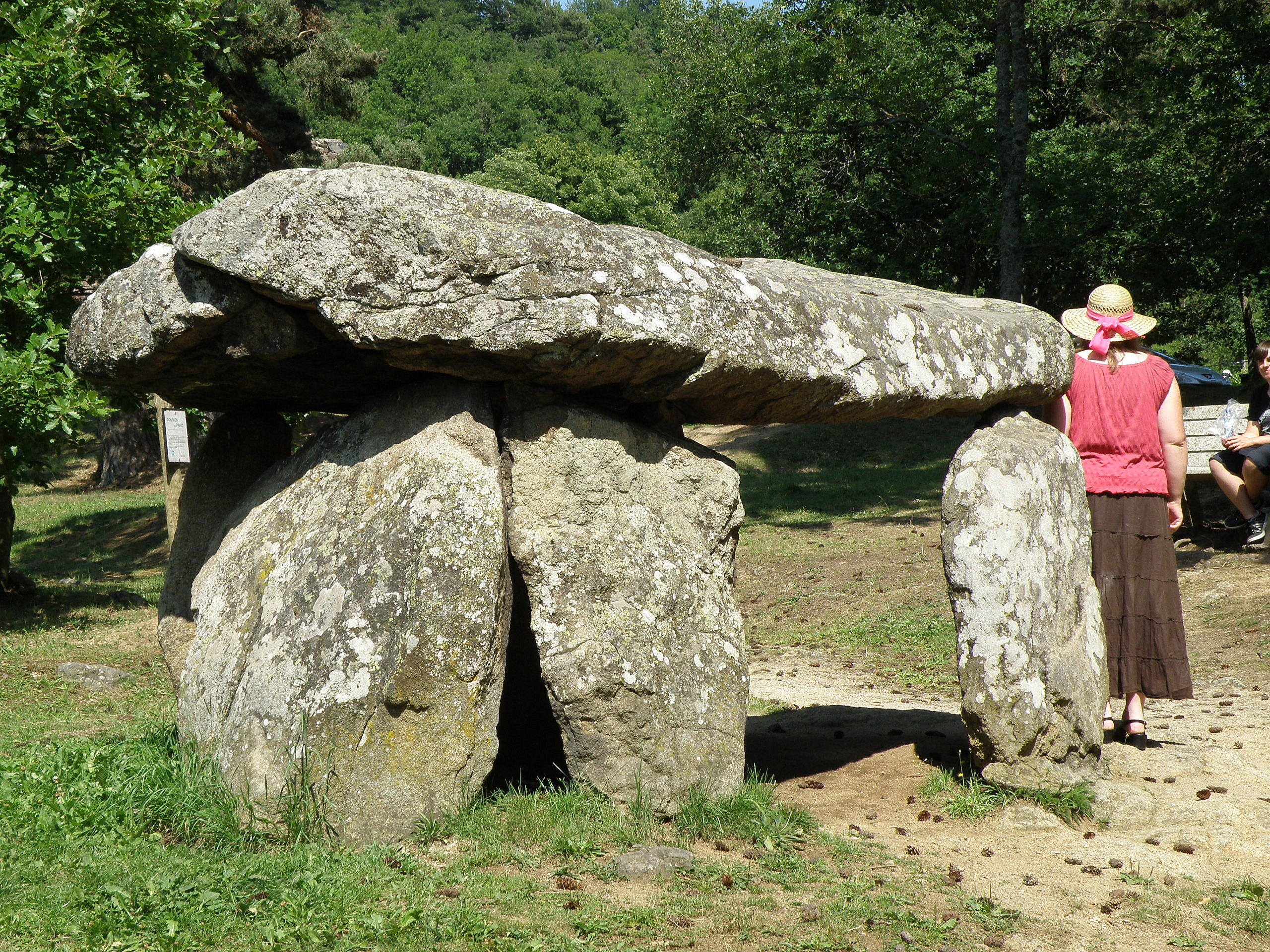 Saint-Nectaire, comm. du Puy-de-Dôme (France, région Auvergne). Dolmen du Parc, à Saint-Nectaire-le-Bas.